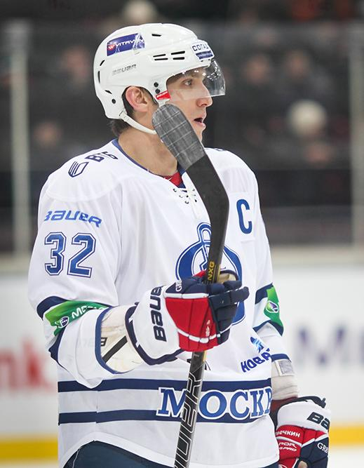 Нападающий московского «Динамо» Александр Овечкин во время матча чемпионата КХЛ против новокузнецкого «Металлурга» 21 декабря 2012 года.